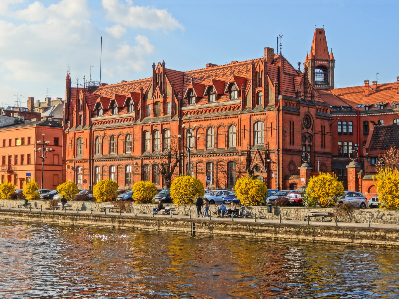 Budynek Poczty Głównej w Bydgoszczy przy ul. Jagiellońskiej (zbud. 1883 skrzydło płd, 1899 skrzydło płn)